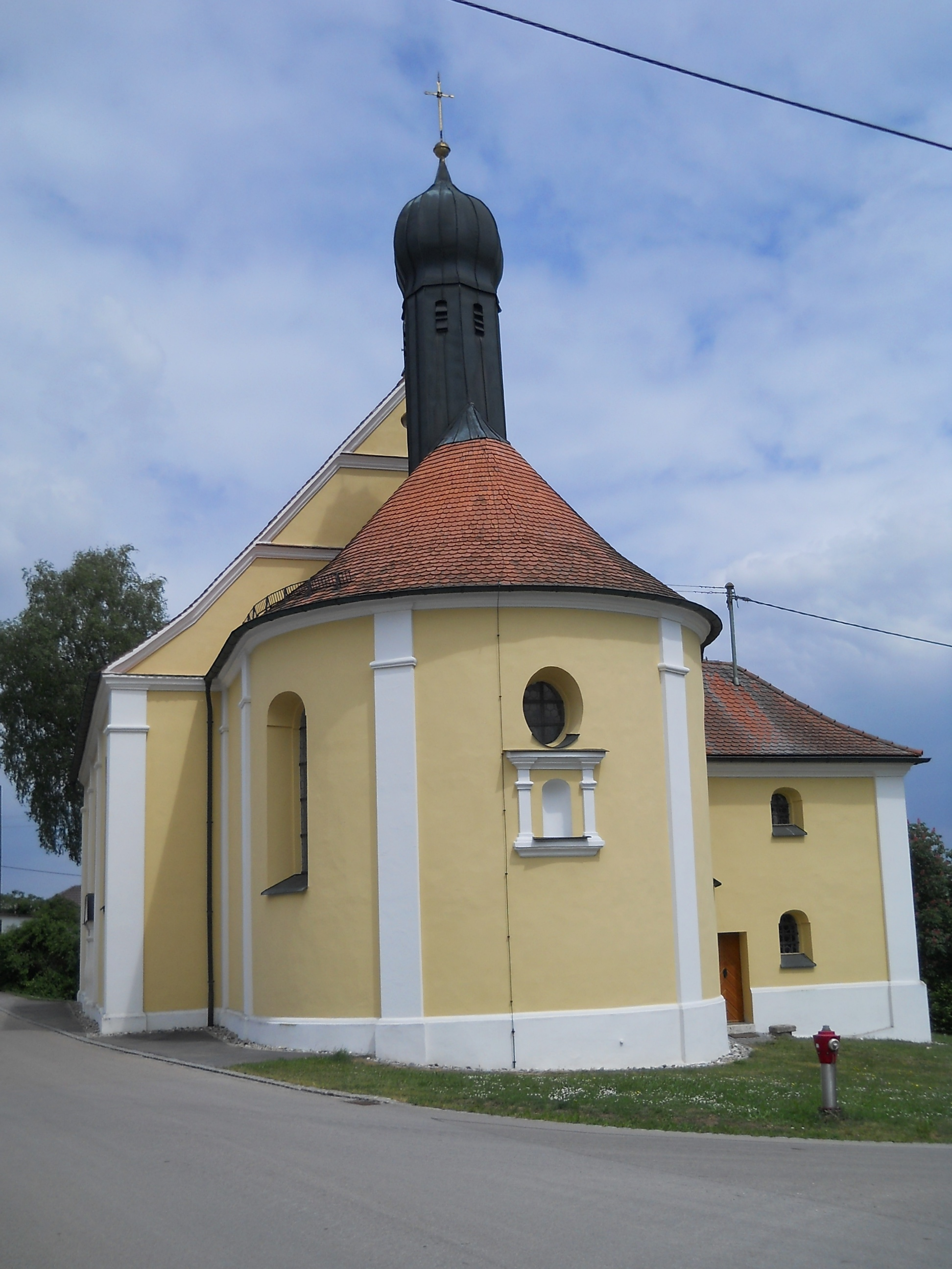 Kienberg, Ortsteil von Rennertshofen im bayerischen Landkreis Neuburg-Schrobenhausen, Wallfahrtskapelle St. Leonhard